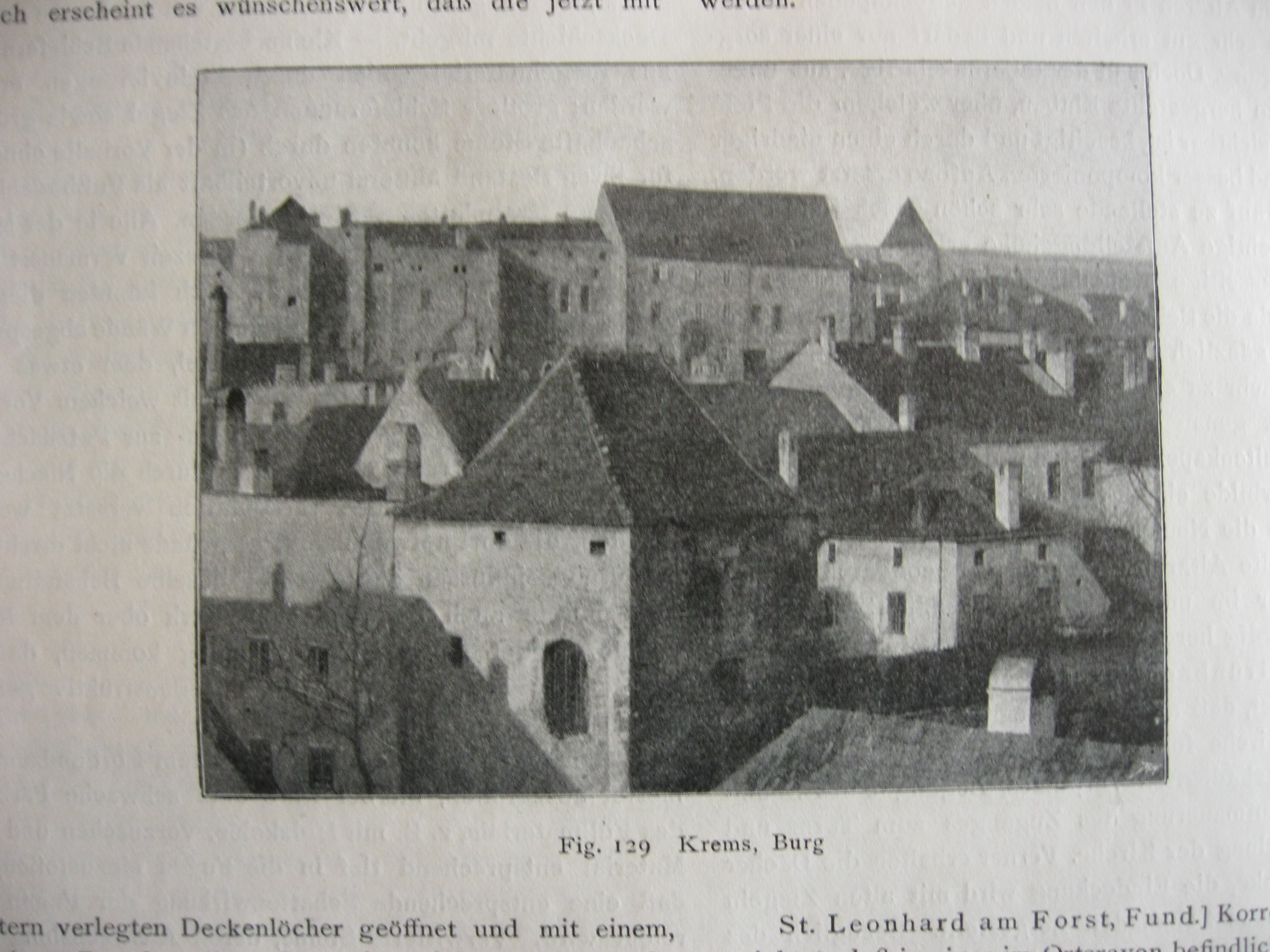 BDA-Archiv - Ansicht von Krems an der Donau von Süden. Im Vordergrund ein Stadtmauerturm. In der Mitte oberhalb die Gozzoburg und rechts dahinter der Pulverturm. Bildbeispiele Jahrgang Wien 1911 Mittheilungen der Zentralkommission für Denkmalpflege